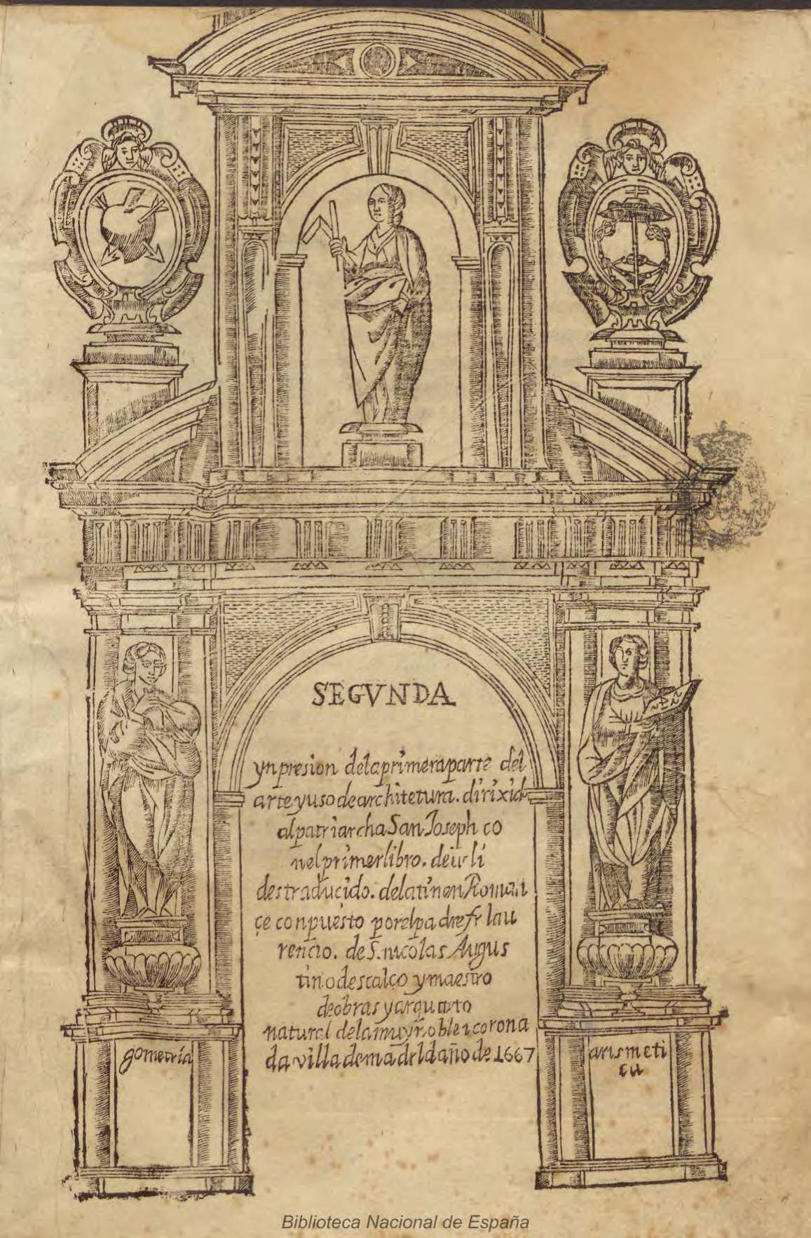 Frontis de Segunda ynpresion de la primera parte del arte y uso de architetura: dirixido al patriarcha San Joseph con el primer libro deuclides traducido de latin en Romançe conpuesto por el padre Fr. Laurencio de S. Nicolas Augustino descalço y maestro de obras y arquitecto natural ... de la ... villa de madrid año de 1667. Biblioteca Nacional de España. Grabado calcográfico arquitectónico con las figuras de la Geometría y la Aritmética en los laterales del arco y la arquitectura en el ático.